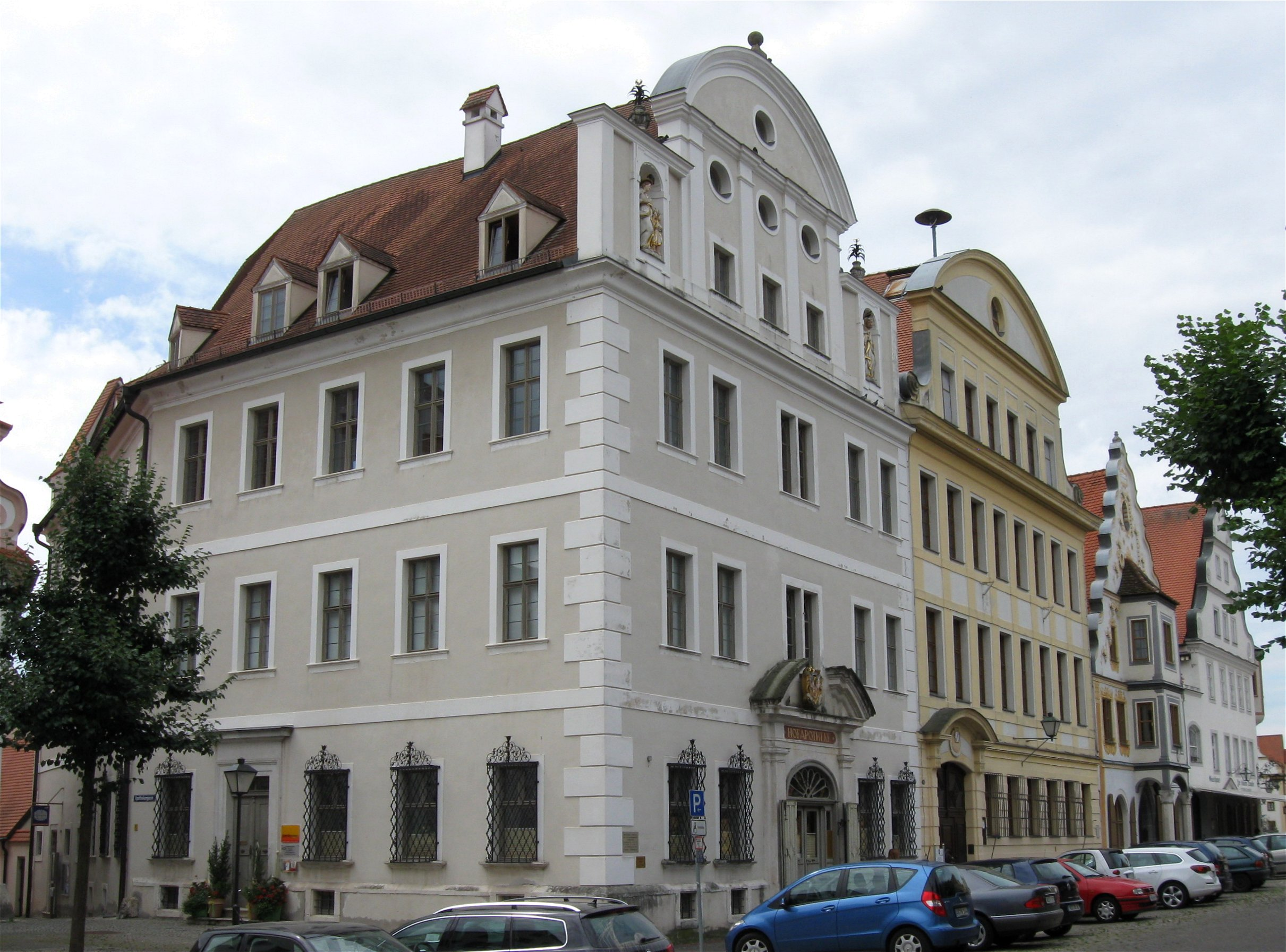 Amalienstraße A 52; ehemalige Apotheke (von 1837 - 1995), ehemalige Fürstenherberge, stattlicher dreigeschossiger Eckbau mit Geschoßbänderung, Vorschußmauer mit Figurennischen und pilastergegliedertem Segmentgiebel, wohl Johann Puchtler, 1713. D-1-85-149-31